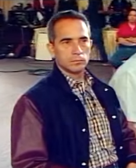 Freddy Bernal como Alcalde del Municipio Libertador de Caracas en 2003.